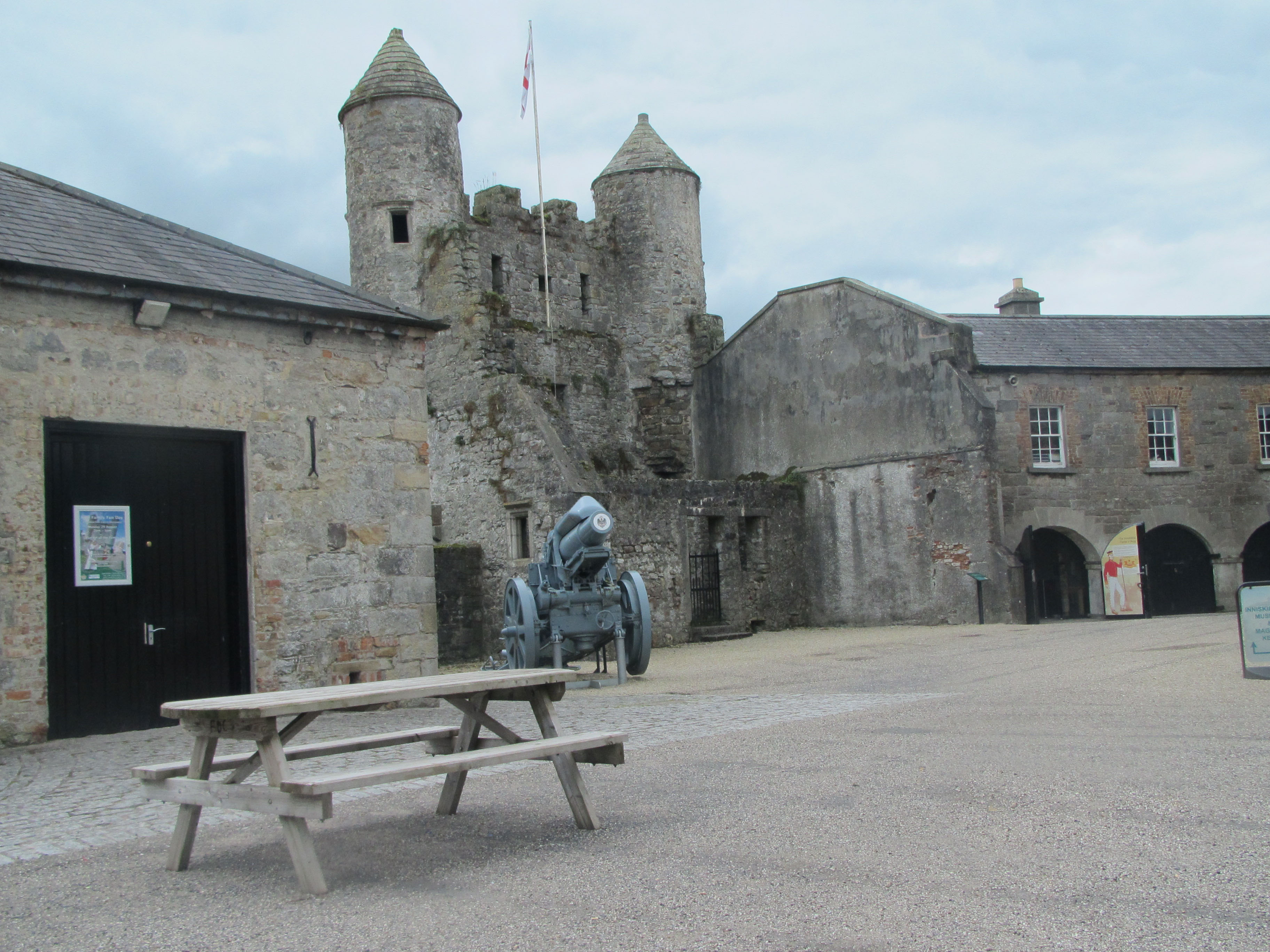 Enniskillen Castle2 by Paride